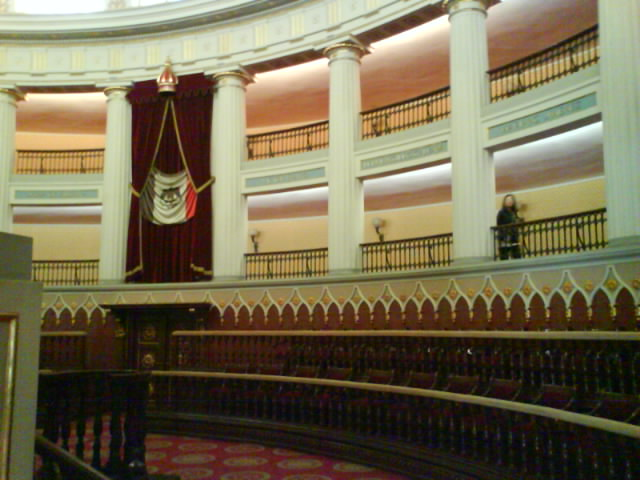 Sede del congreso al interior de Palacio Nacional